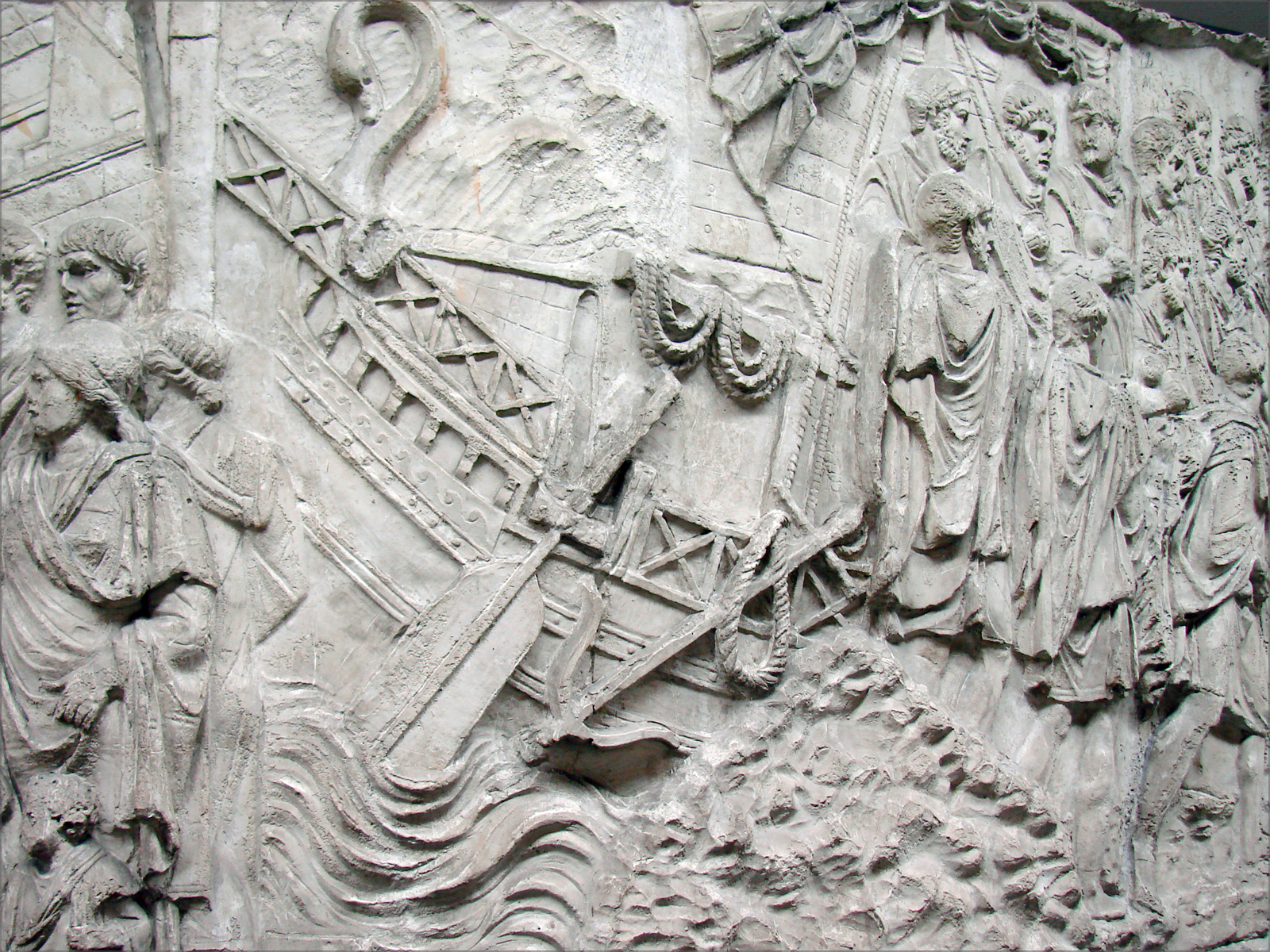 Les moulages de la colonne Trajane. sont présentés dans le musée de la civilisation romaine (Museo della civiltà romana) situé dans le quartier de l'EUR à Rome. La colonne Trajane (en latin : Columna Traiani) est un monument situé à Rome, sur le Forum de Trajan, au centre d'une place rectangulaire, derrière la Basilica Ulpia, entre la Bibliothèque Ulpia et le temple de Trajan, dont l'emplacement exact est sujet à controverses. Elle fut érigée en 113 par Trajan (96-117), pour immortaliser les campagnes qu'il mena contre les Daces en 101-102 et 105-107 ap.J.C.. extrait de l'article de Wikipedia sur la colonne Trajane Article de Wikipedia sur le musée de la civilisation romaine